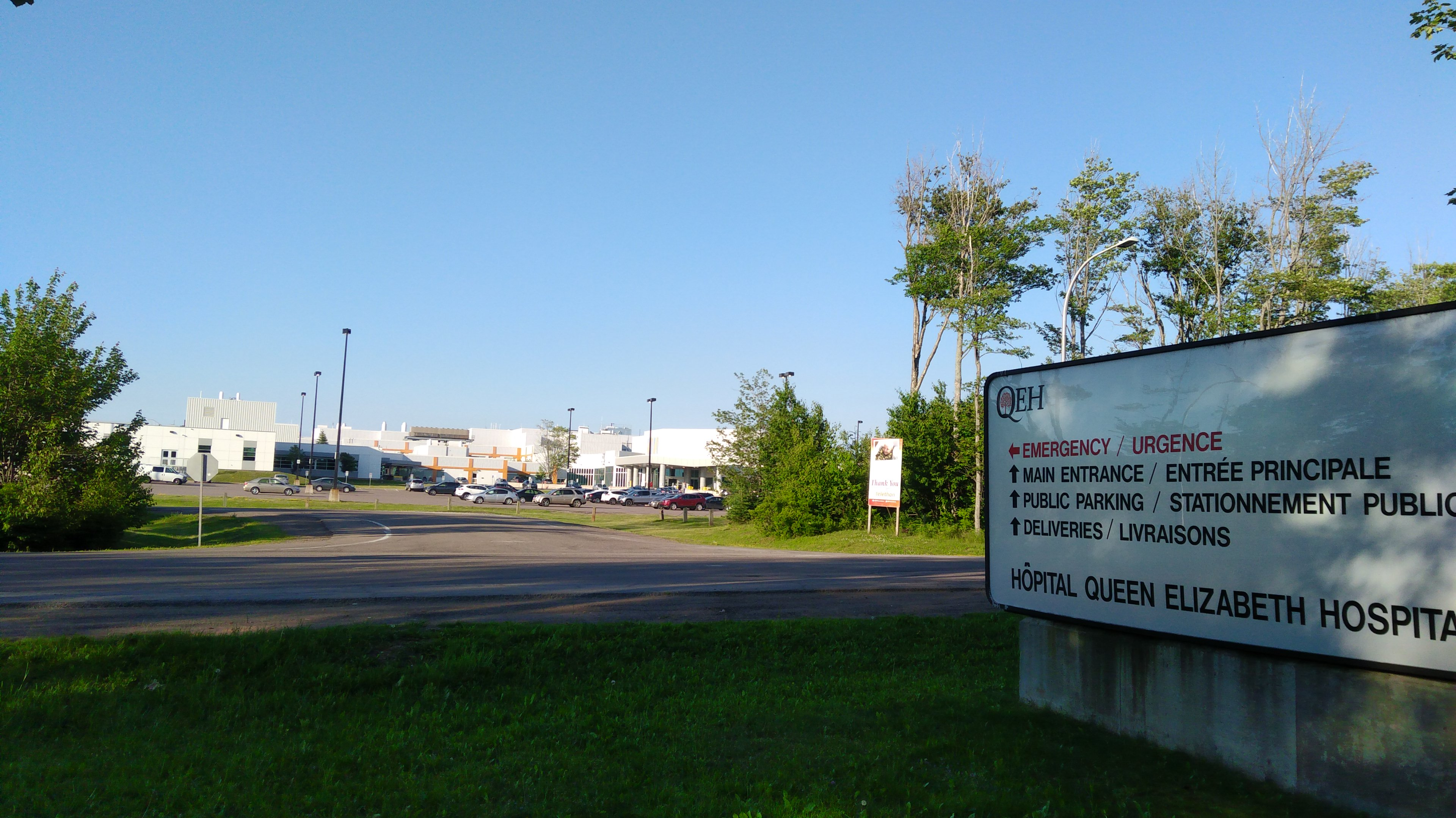 hospital